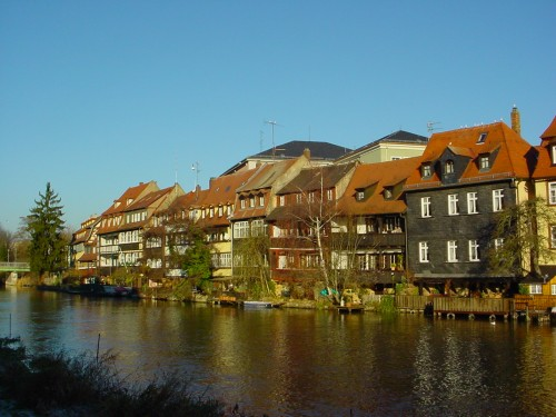 Bamberg: Klein Venedig, fotografiert Dezember 2003